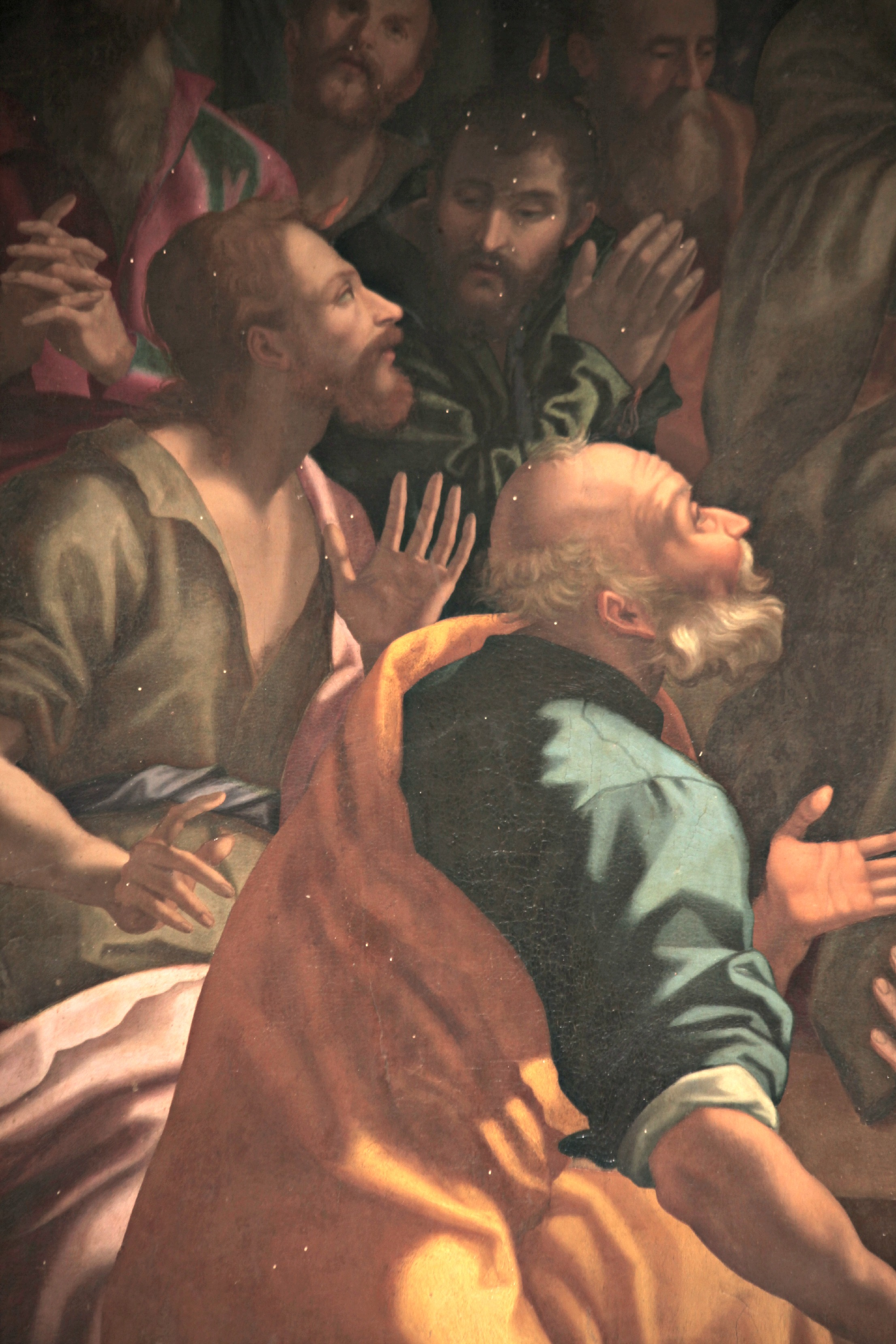 Santi, Discesa dello Spirito Santo di Giovan Battista Naldini, Badia Fiorentina (2)